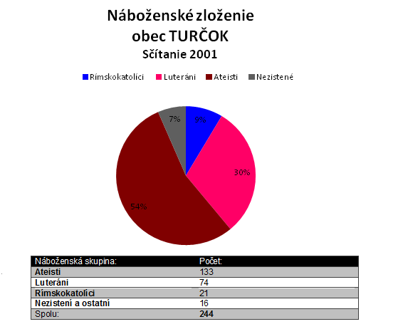 Náboženské zloženie obce Turčok.